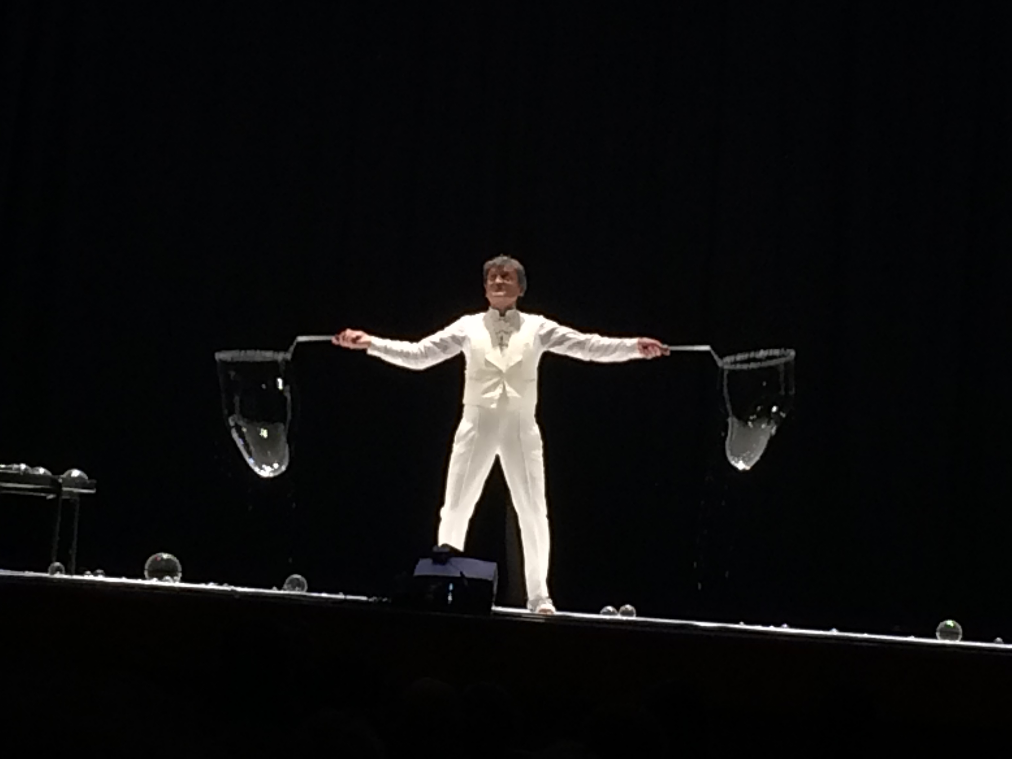 Actuació de Pep Bou a la Garriga (Catalunya), el 7 de febrer de 2015